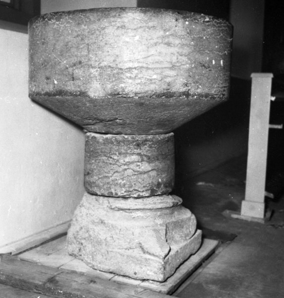 Dopfunt, kalksten, 1200-tal. Kategori: (04) DopfuntarDopfunt, kalksten, 1200-tal.